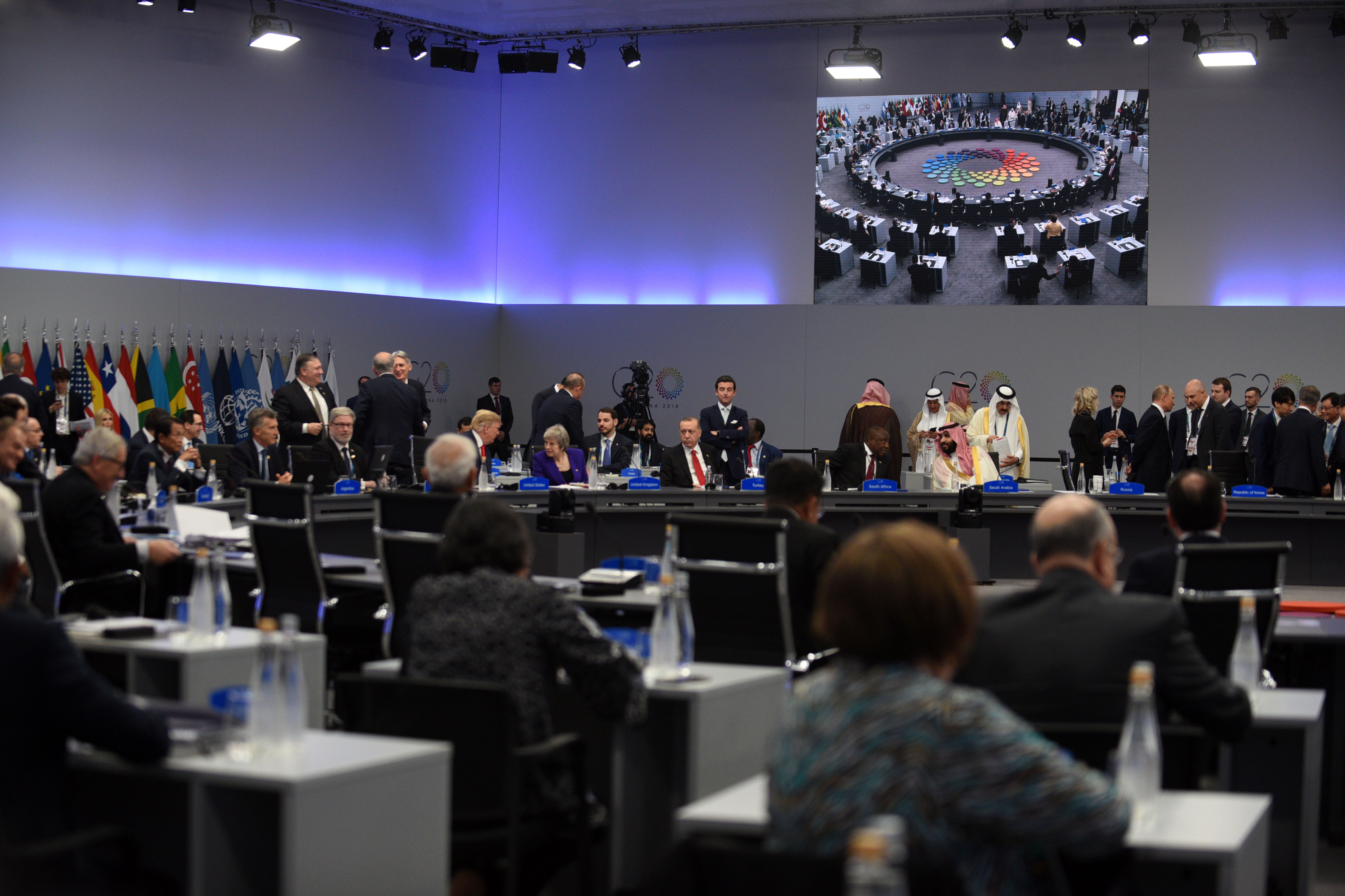 Plenary